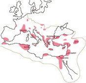 Kristendommens tidlige spredning. Områder med stærke kristne menigheder omkring år 325